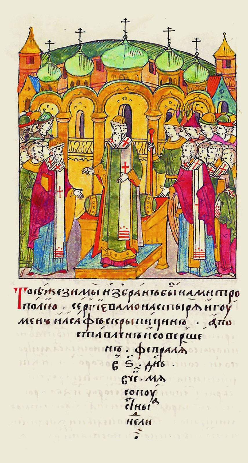 Миниатюра Лицевого летописного свода XVI в.: "Той же зимой избран был на митропо- лию игумен Сергиева монастыря Иоасаф Скрипицын, а по- ставлен и совершен в феврале в шестой день, в четверг Мясо- пустной недели».